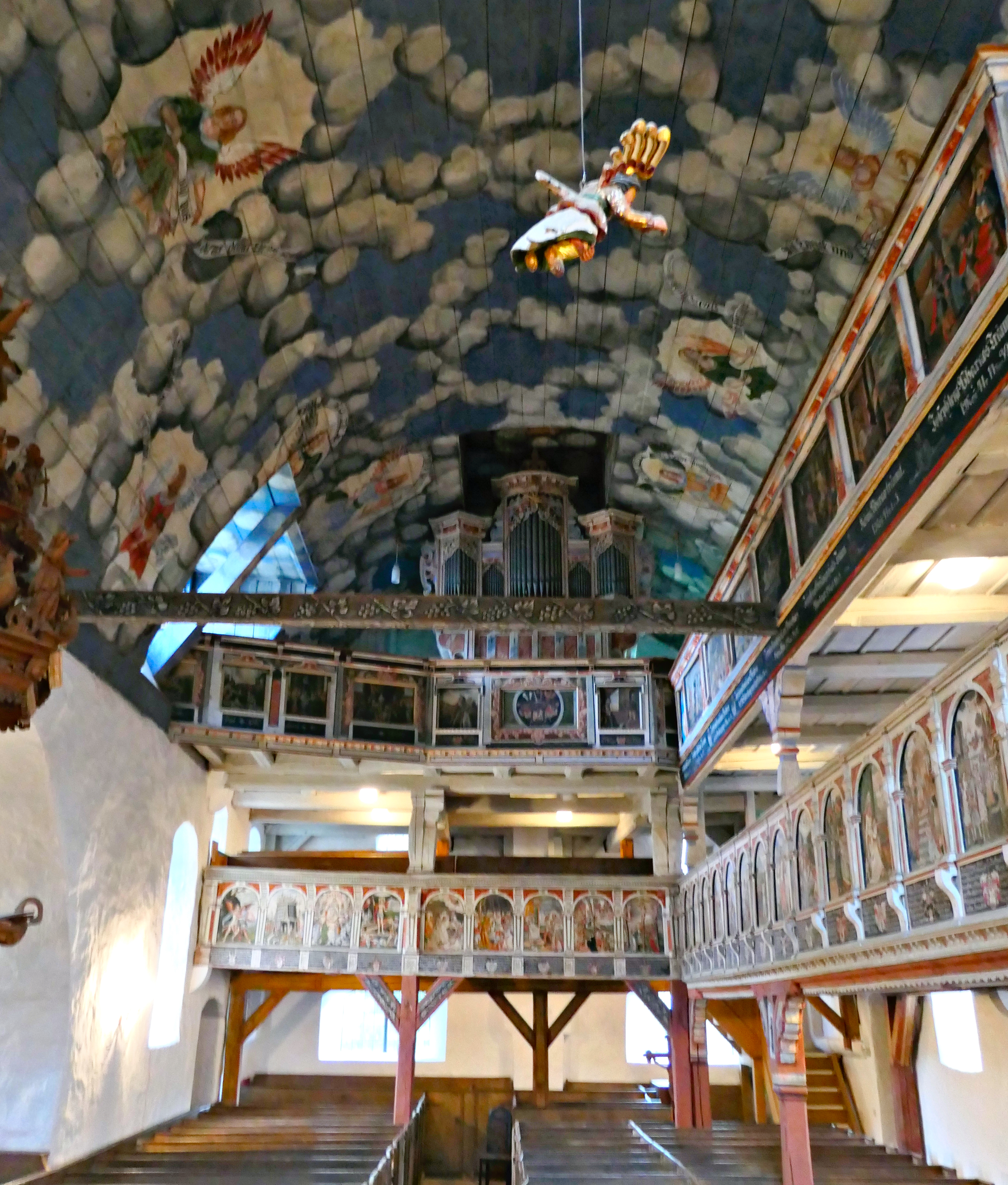 St.-Theobaldi-Kapelle Wernigerode, Landkreis Harz, Sachsen-Anhalt, Deutschland